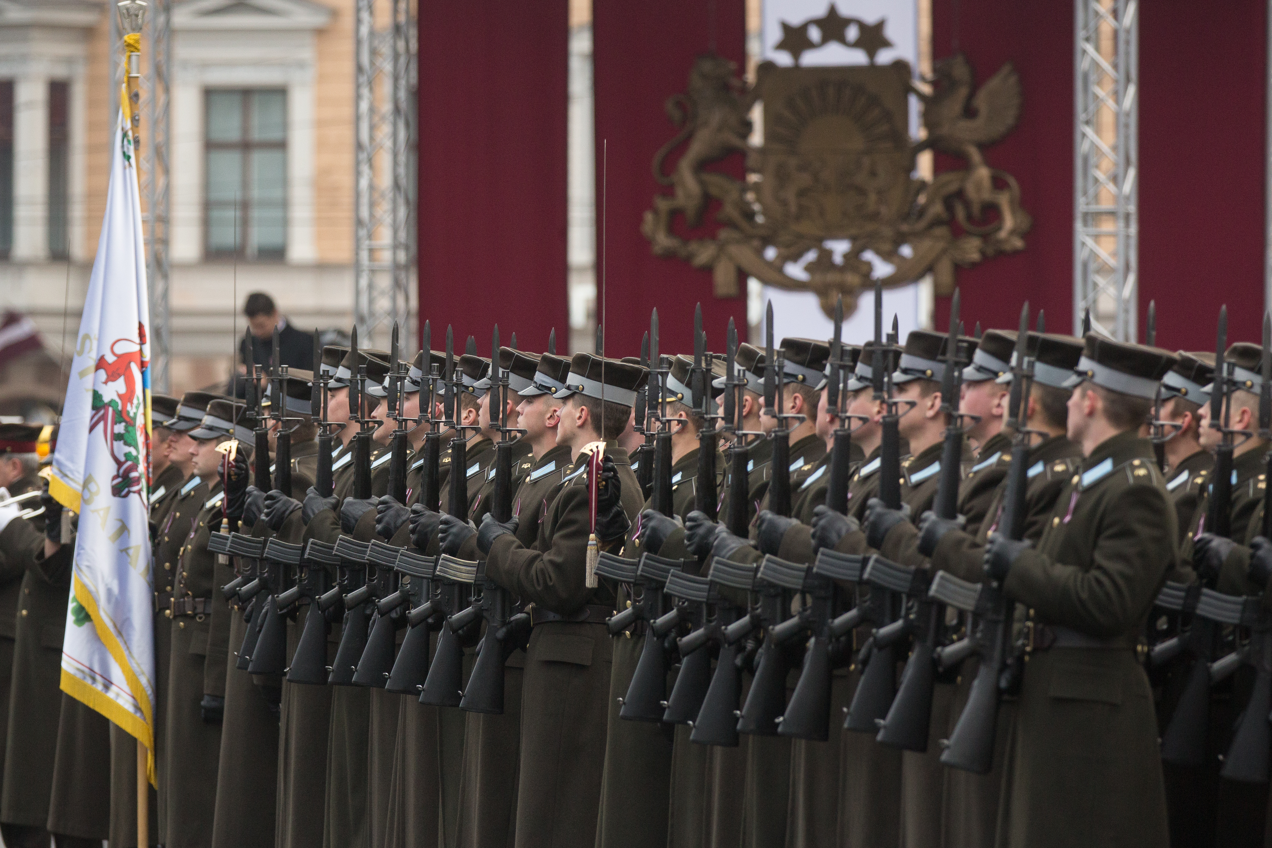 2016.gada 18.novembris. Latvijas Republikas proklamēšanas 98. gadadienai veltītā ziedu nolikšanas ceremonija pie Brīvības pieminekļa. Foto: Ernests Dinka, Saeimas Administrācija Izmantošanas noteikumi: saeima.lv/lv/autortiesibas